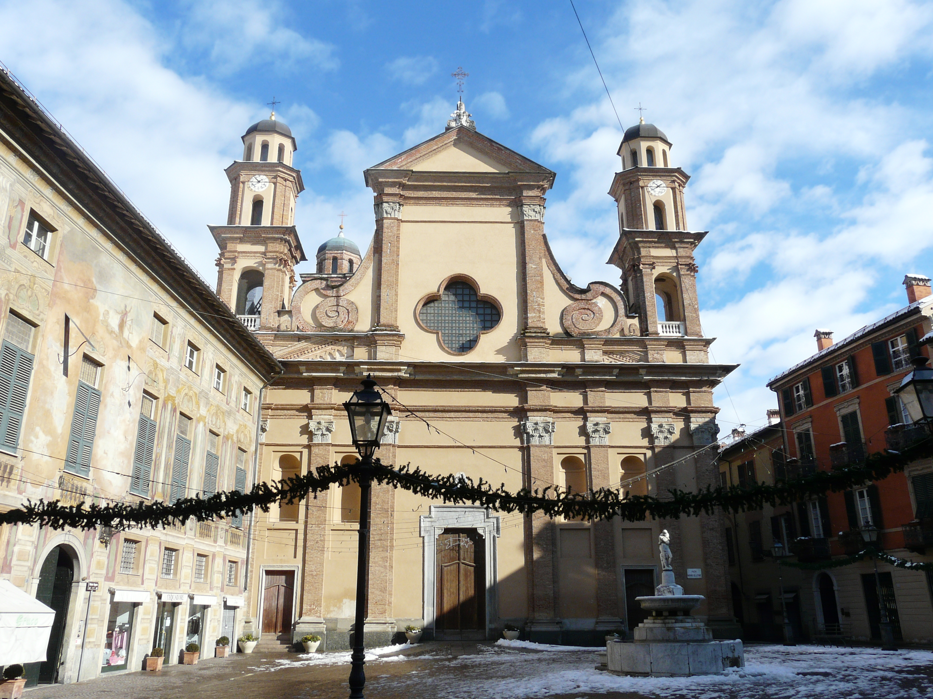 Collegiata Santa Maria Maggiore, Novi Ligure, Piemonte, Italia